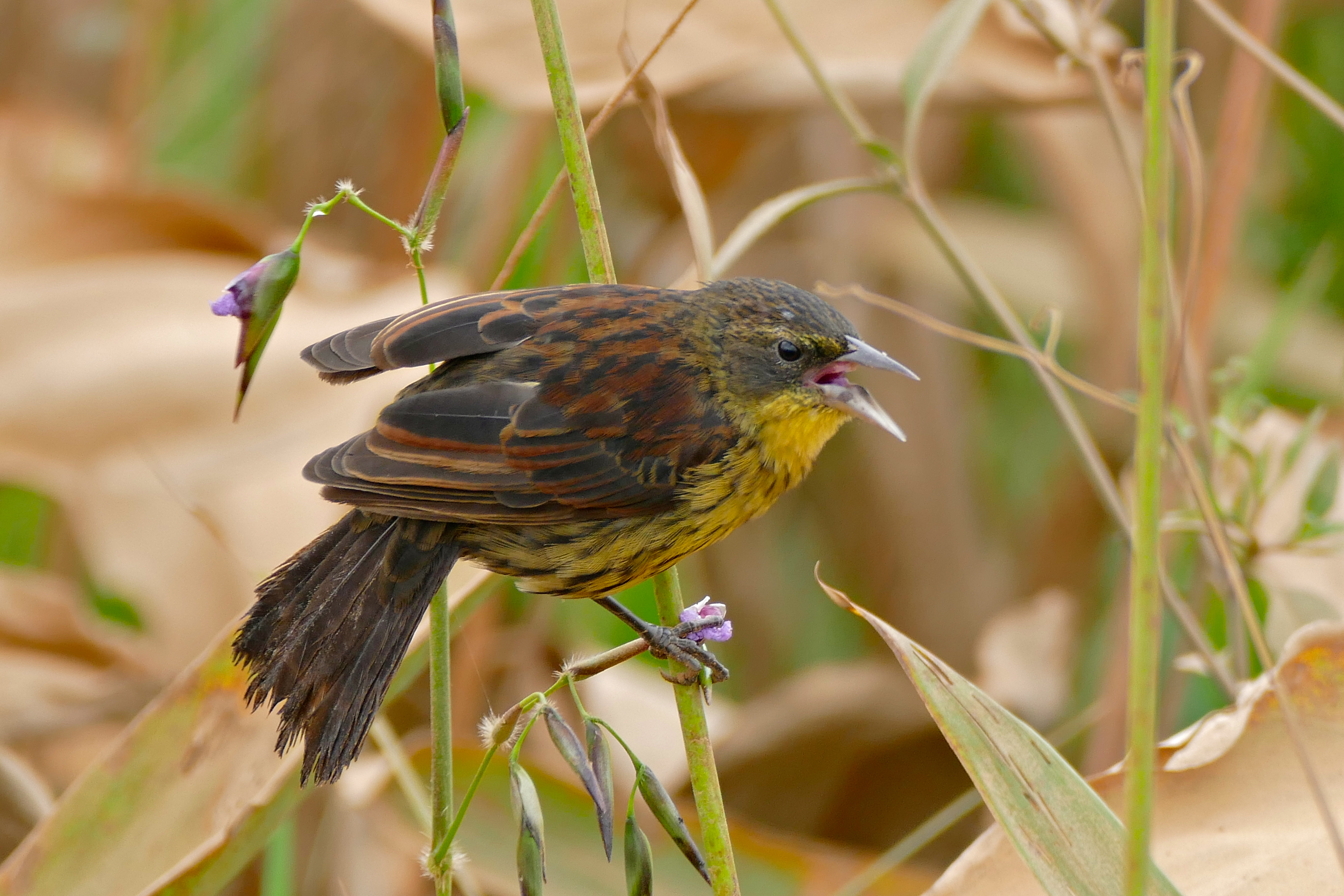 Transpantaneira, Poconé, Mato Grosso, BRAZIL